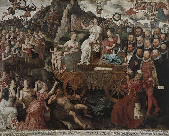 a